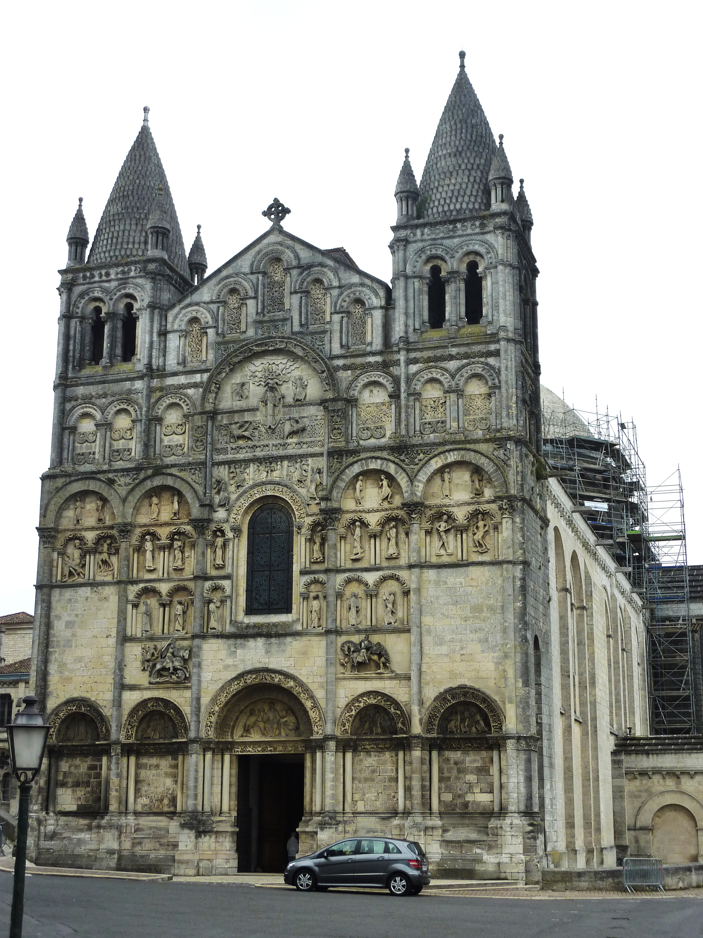 Angoulême: la façade de la cathédrale Saint-Pierre